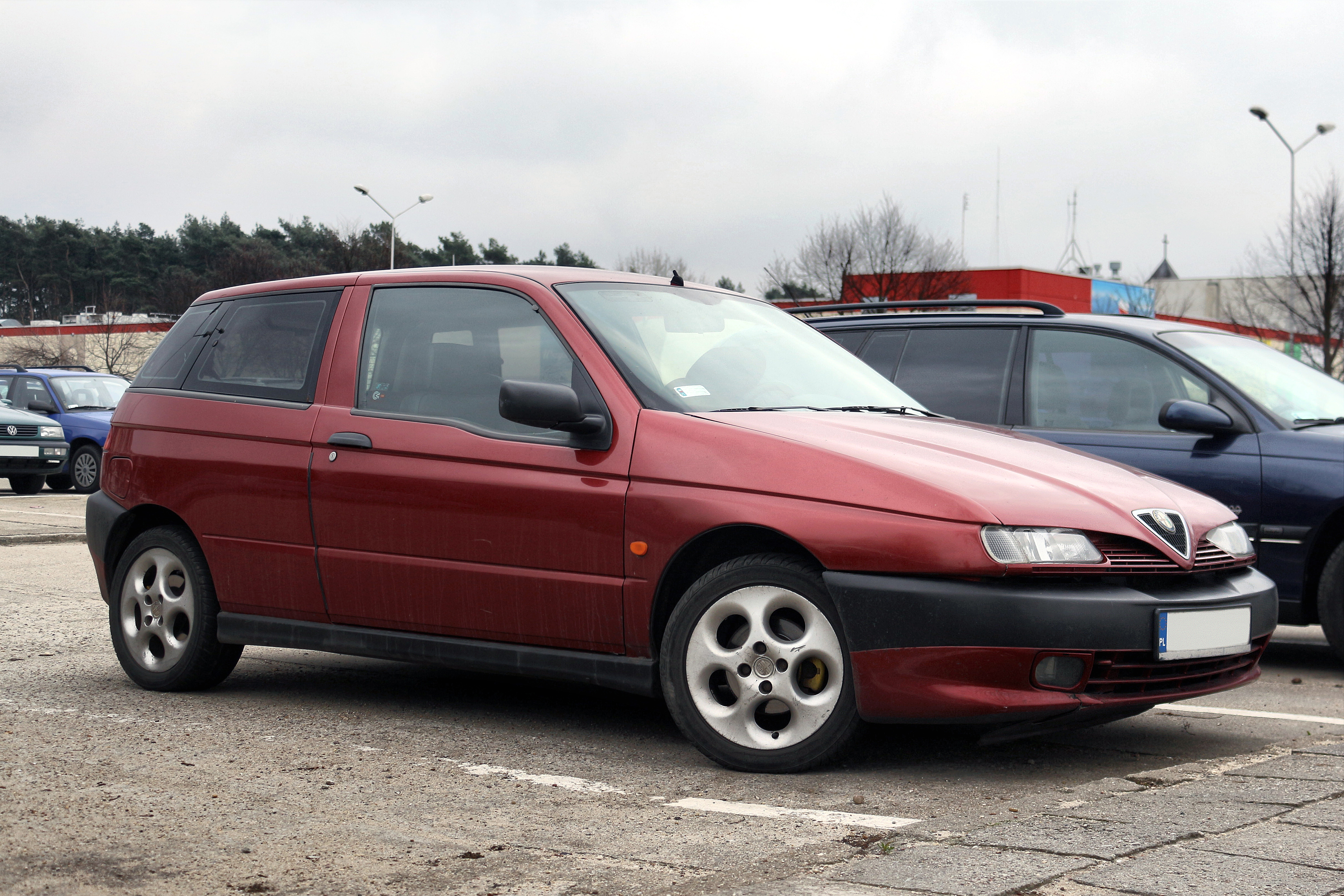 Interlingua: Alfa Romeo 145